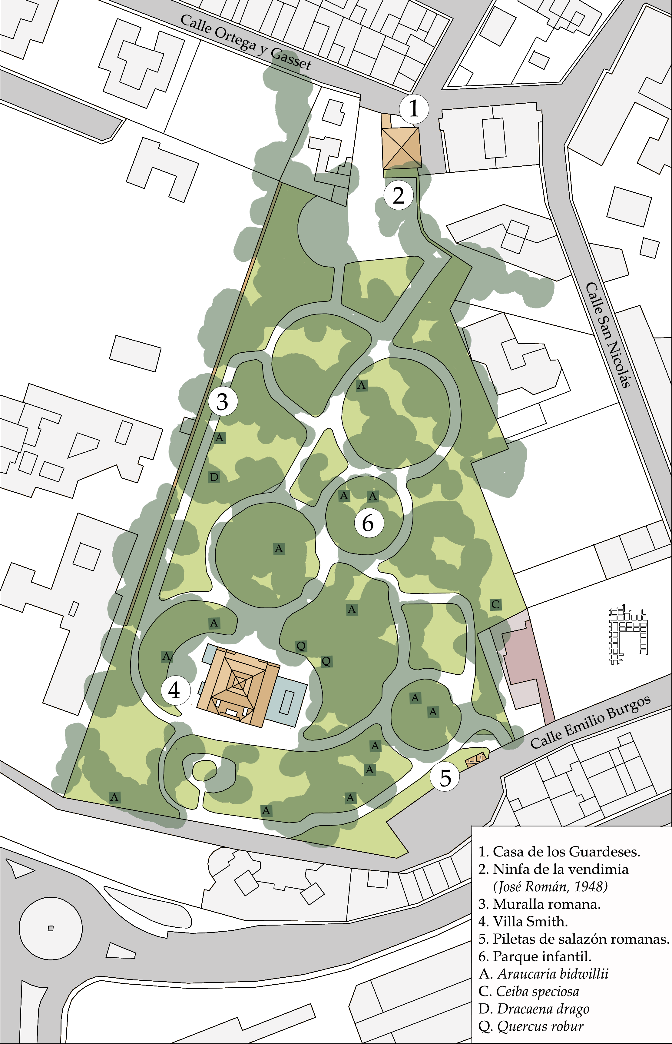 Situación del Parque de las Acacias de Algeciras.